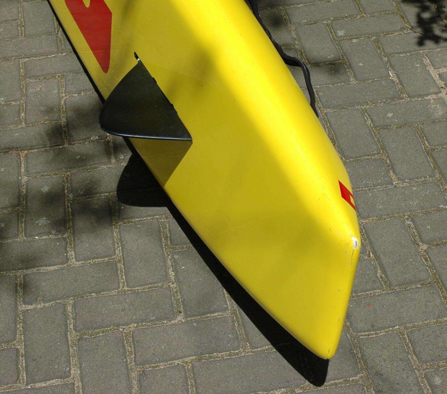 Rettungsbrettunterseite mit Finne zur Stabilisierung im Wasser